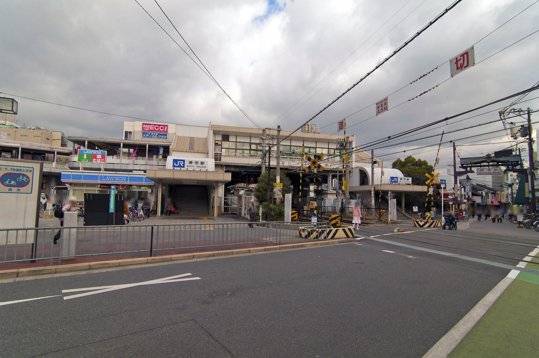 西日本旅客鉄道株式会社阪和線堺市駅橋上駅舎全景